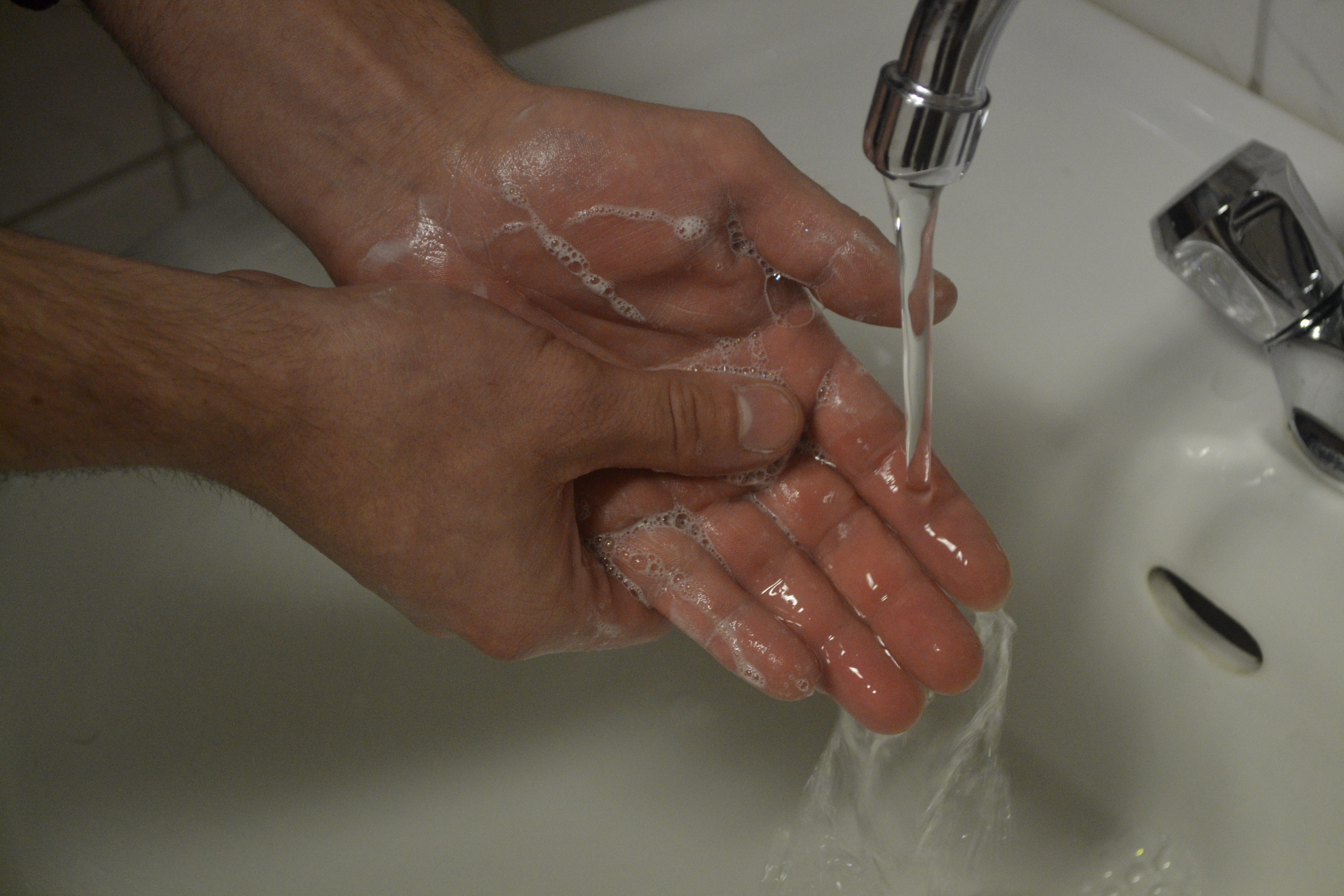 Händewaschen mit Seife und Wasser.